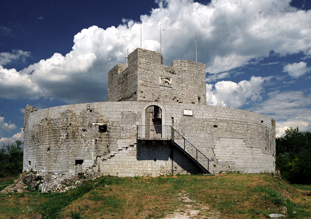 Foto della Rocca di Monfalcone